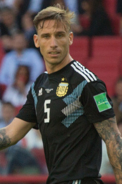 Месси и Ко не смогли обыграть неуступчивых исландцев